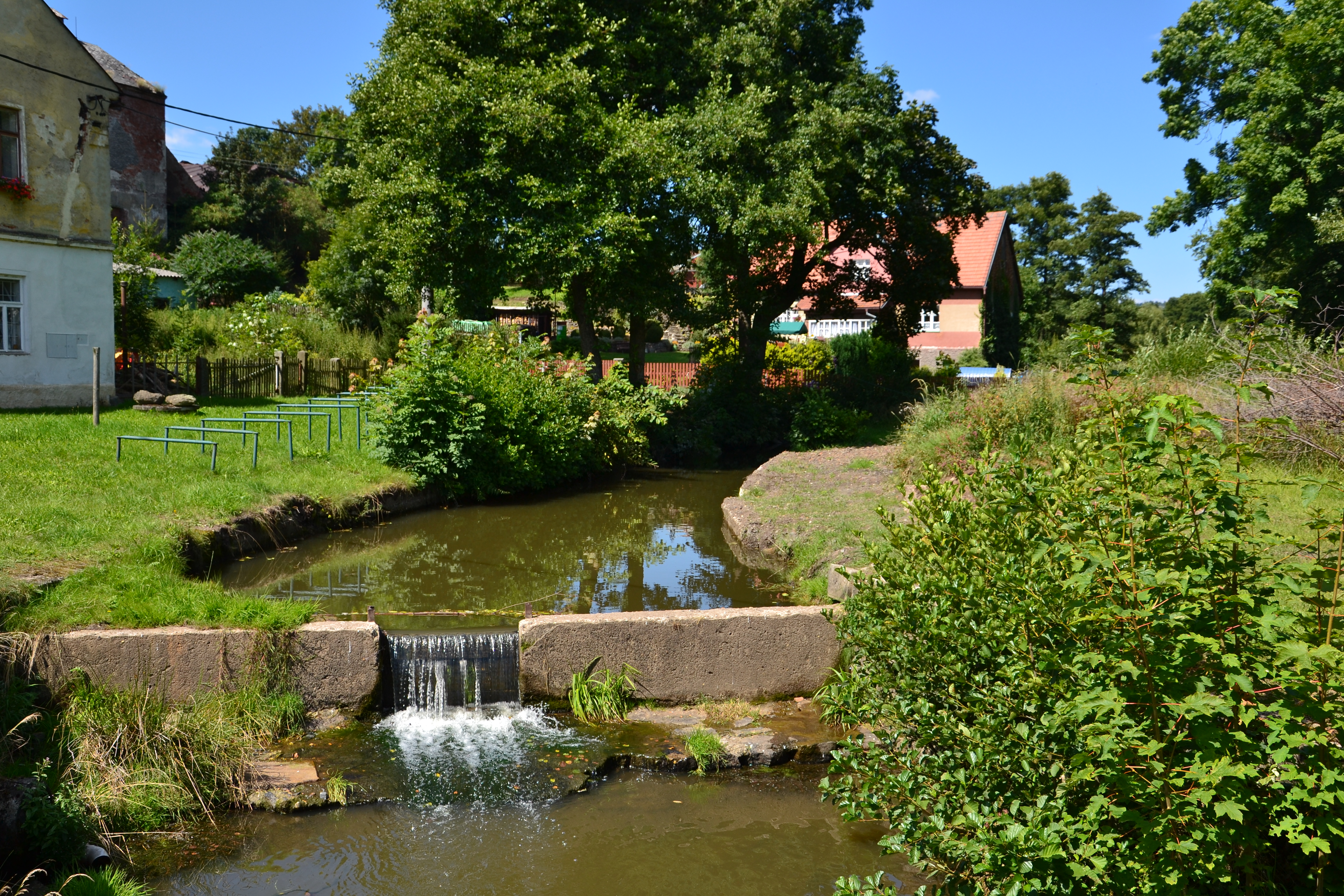 Velká Trasovka v Lukách